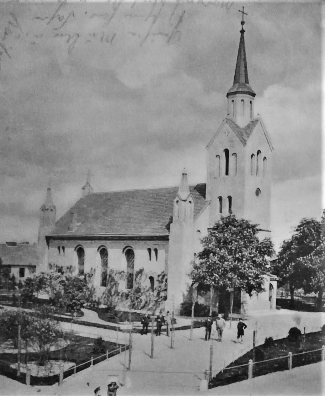 Kościół ewangelicki w Swarzędzu - zdjęcie sprzed 1918 r.